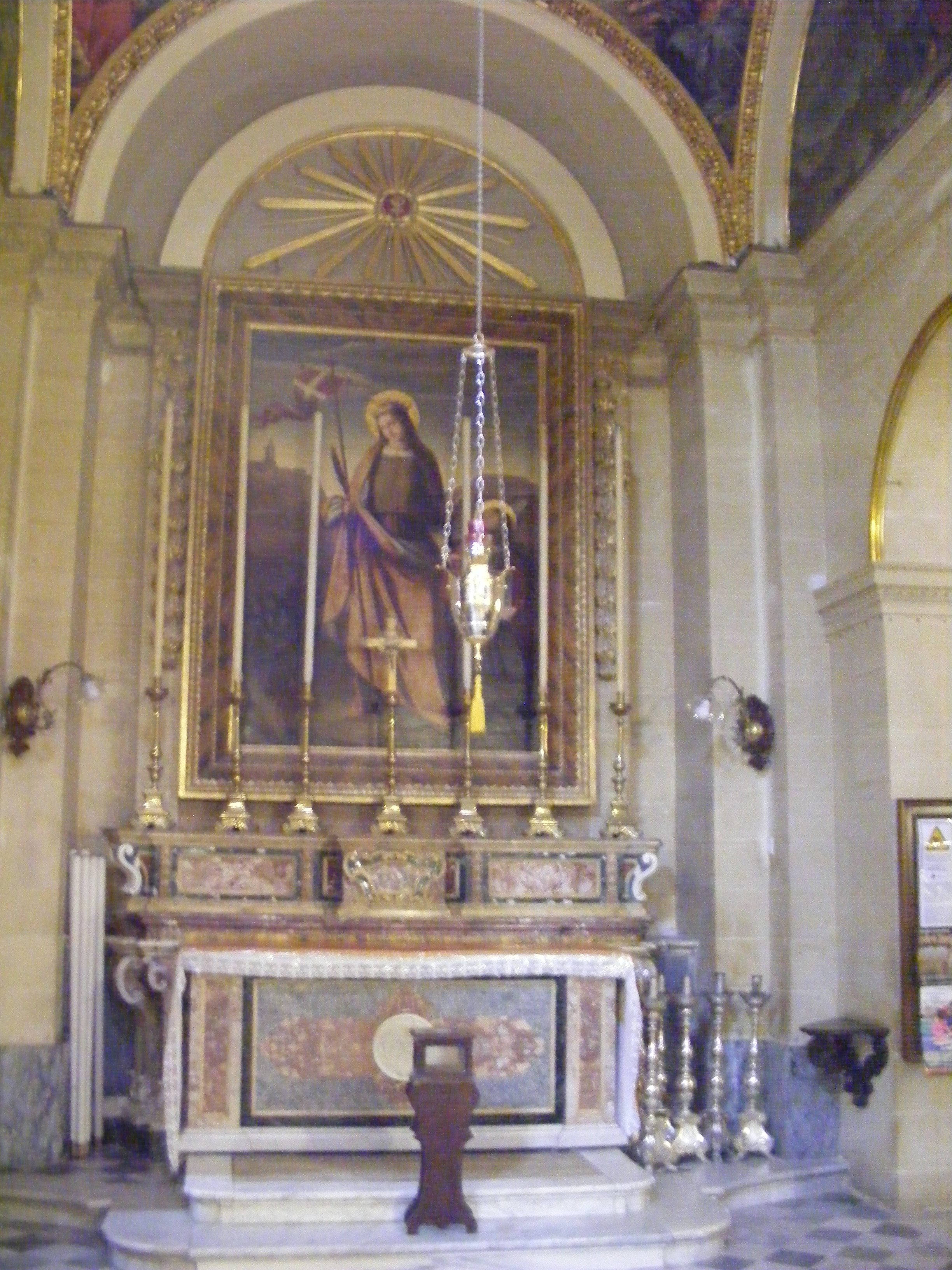 Ołtarz w kaplicy św. Urszuli zawiera obraz maltańskiego malarza Giuseppe Hyzlera z 1831 "Święta Urszula roztacza opiekę nad Gozo".